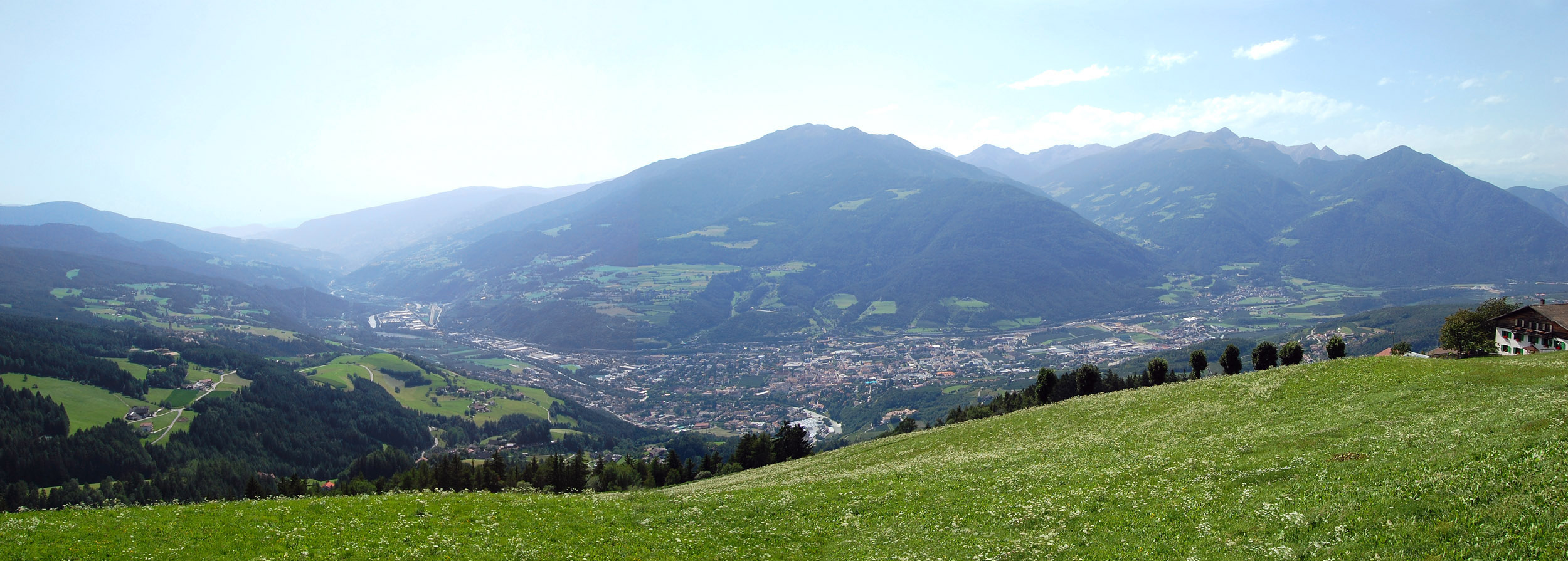 Panorama di Bressanone